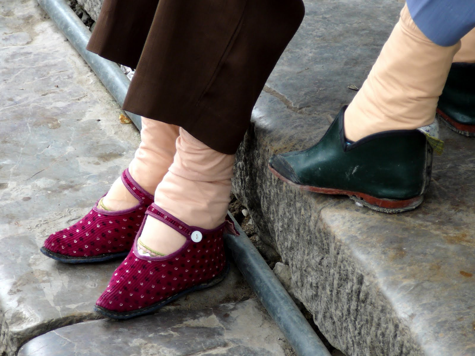 Lotosfüße alter Frauen im Dorf Tuanshan (Yunnan, China)